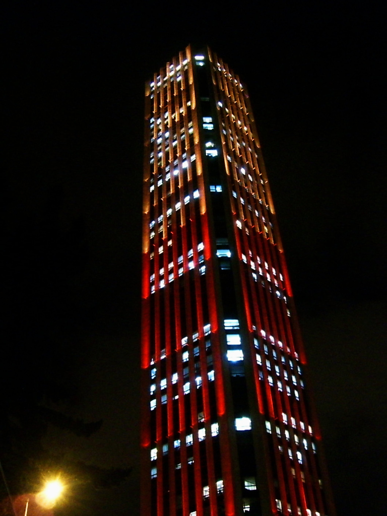 Iluminación nocturna